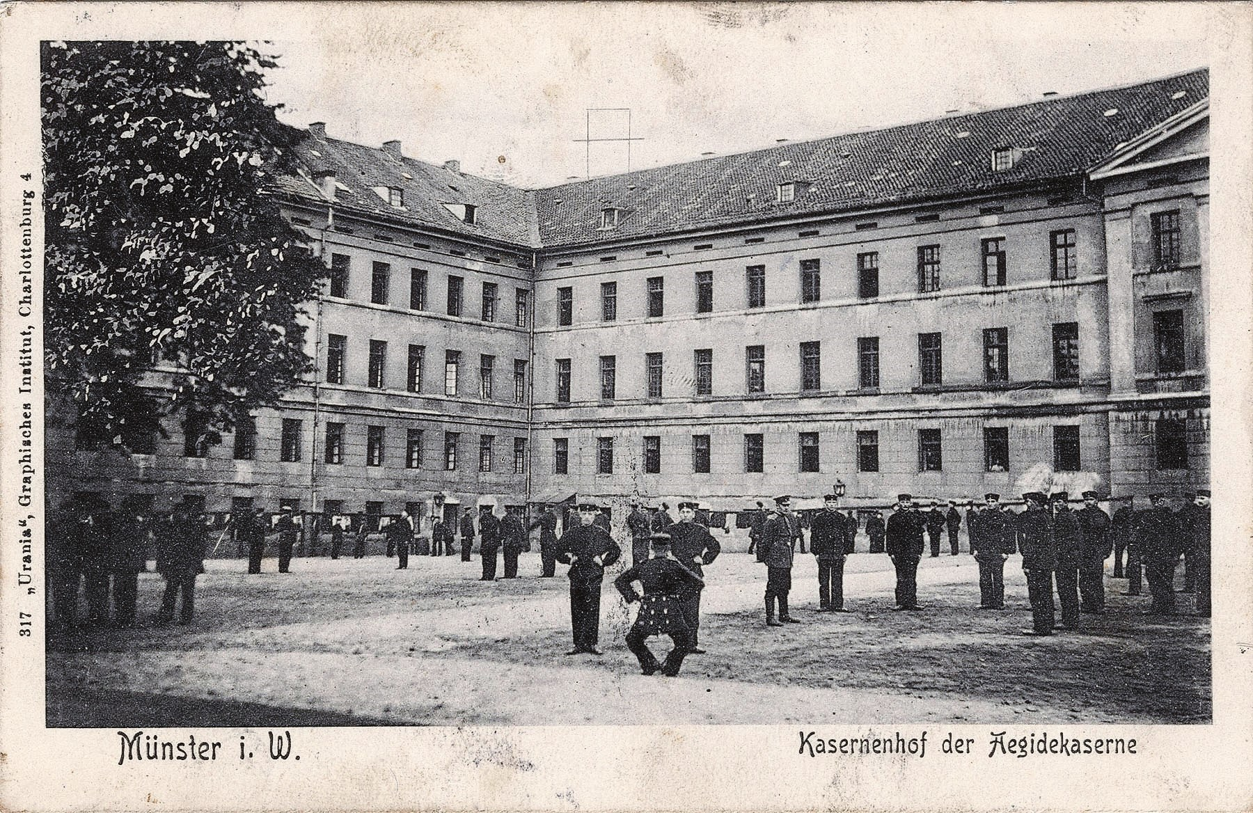 Infanterie-Regiments Nr. 13 im Innenhof der Ägidii-Kaserne, Münster (1910)